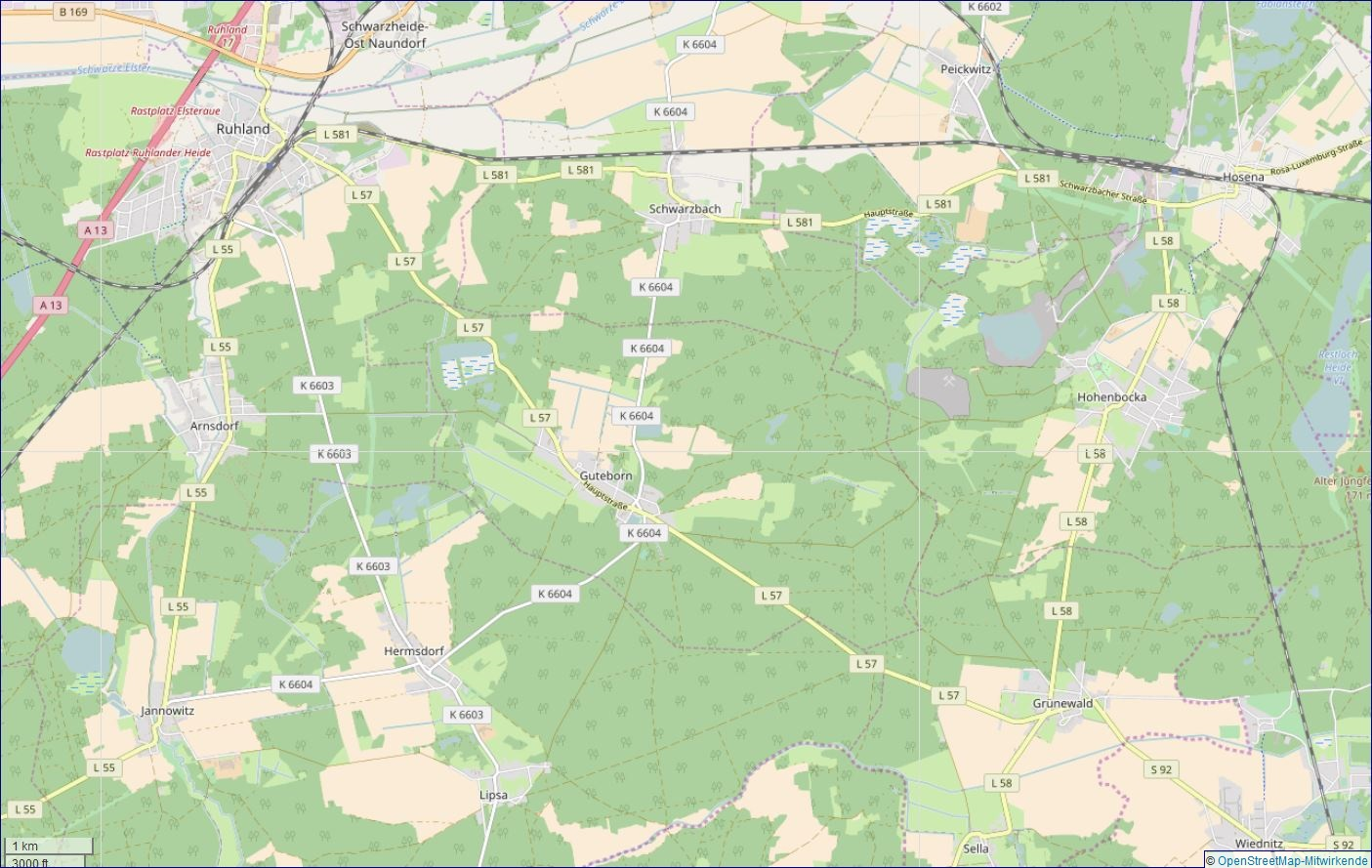 Amt Ruhland Übersicht aus Open Street Map